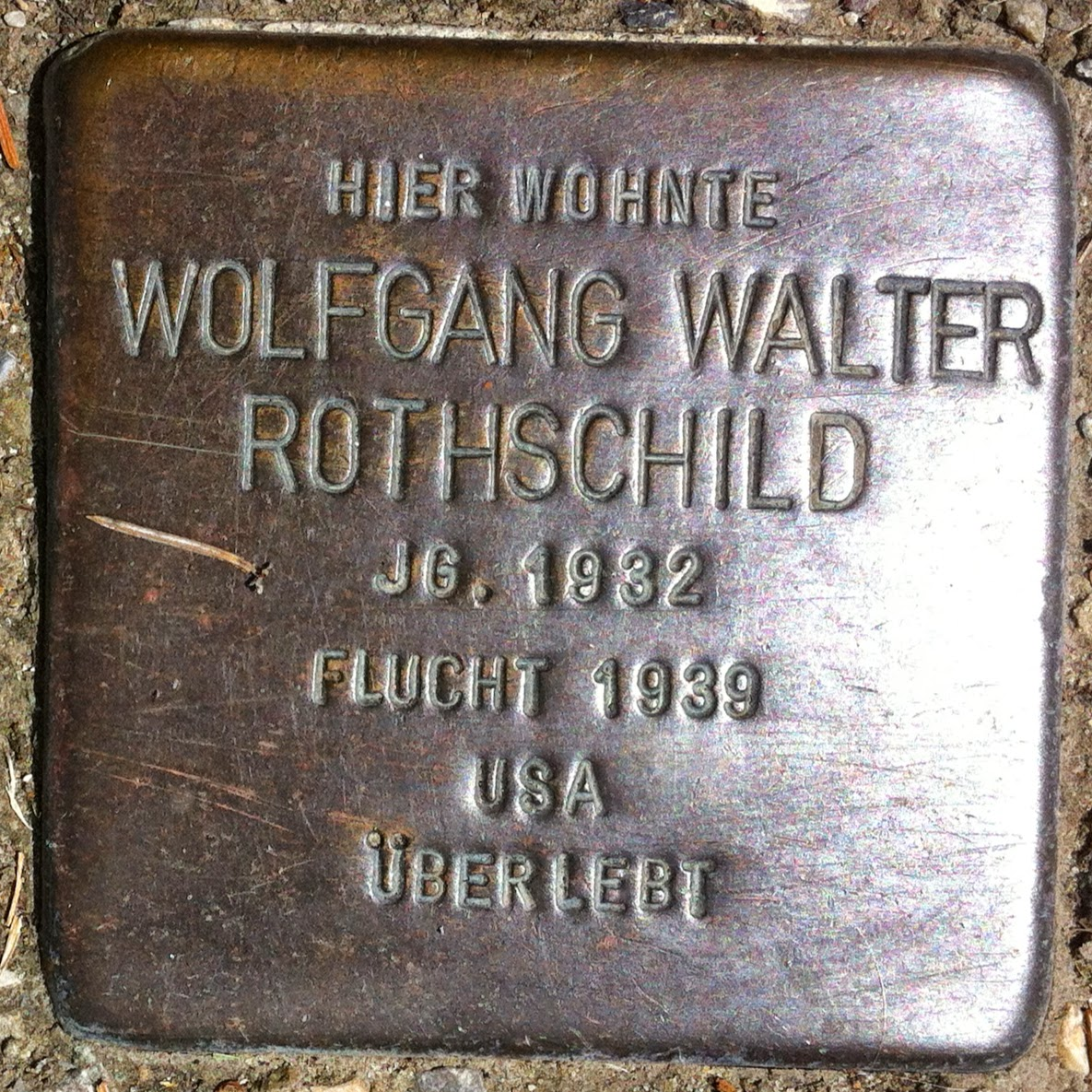 Deutschland (D) - Baden-Württemberg (BW) - Landkreis Konstanz (KN) - Stockach: Stolperstein "Wolfgang Walter Rothschild"